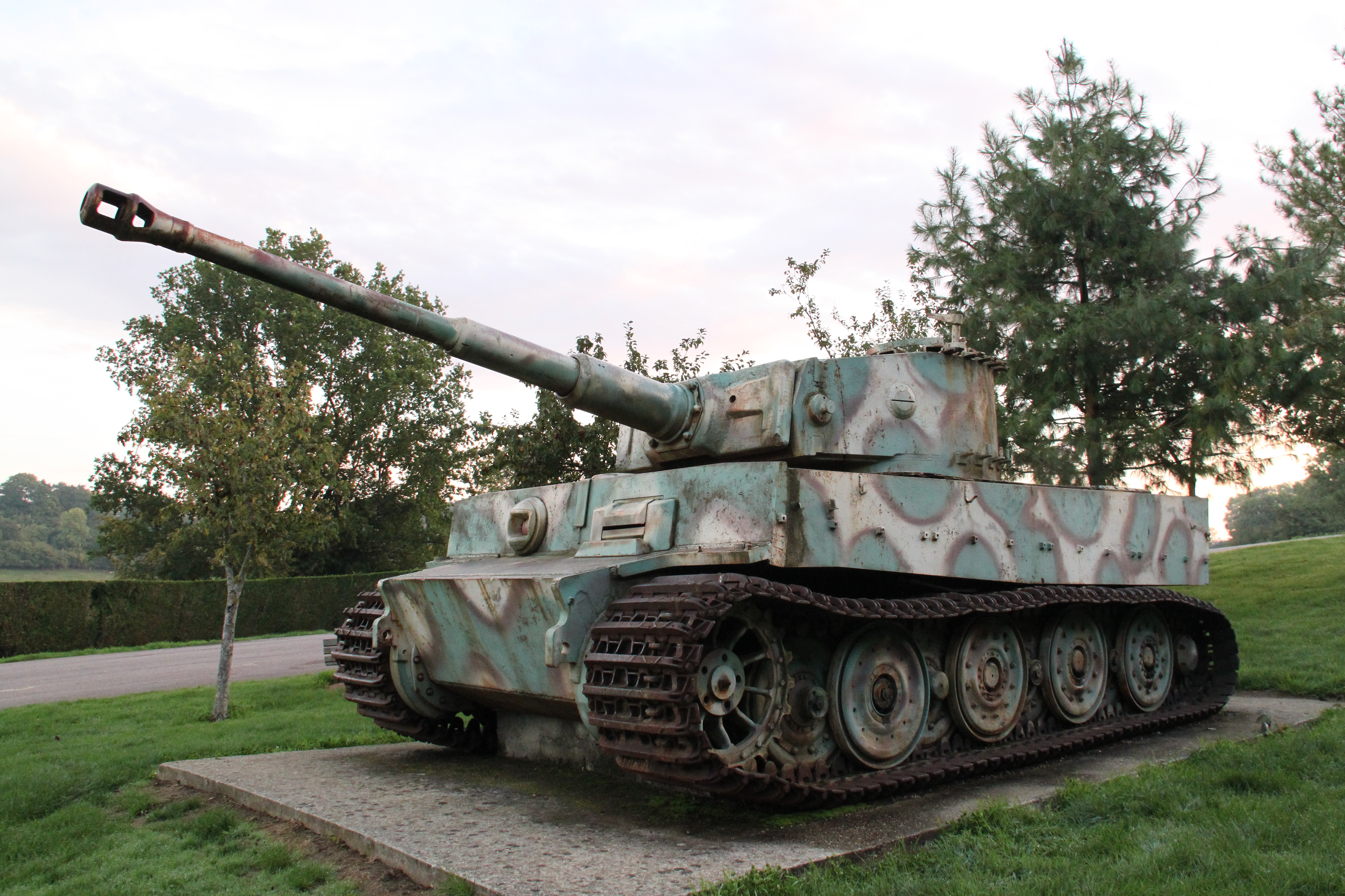 Char Tigre de Vimoutiers, un char Tigre allemand exposé route de Vimoutiers, Orne, France. Abandonné en août 1944 lors de la fermeture de la poche de Chambois (bataille de Normandie), il fut restauré dans les années 1970. Il a été classé au titre d'objet, monument historique en 1975. C'est l'un des deux seuls exemplaires subsistant en France (le second est au musée des blindés de Saumur).